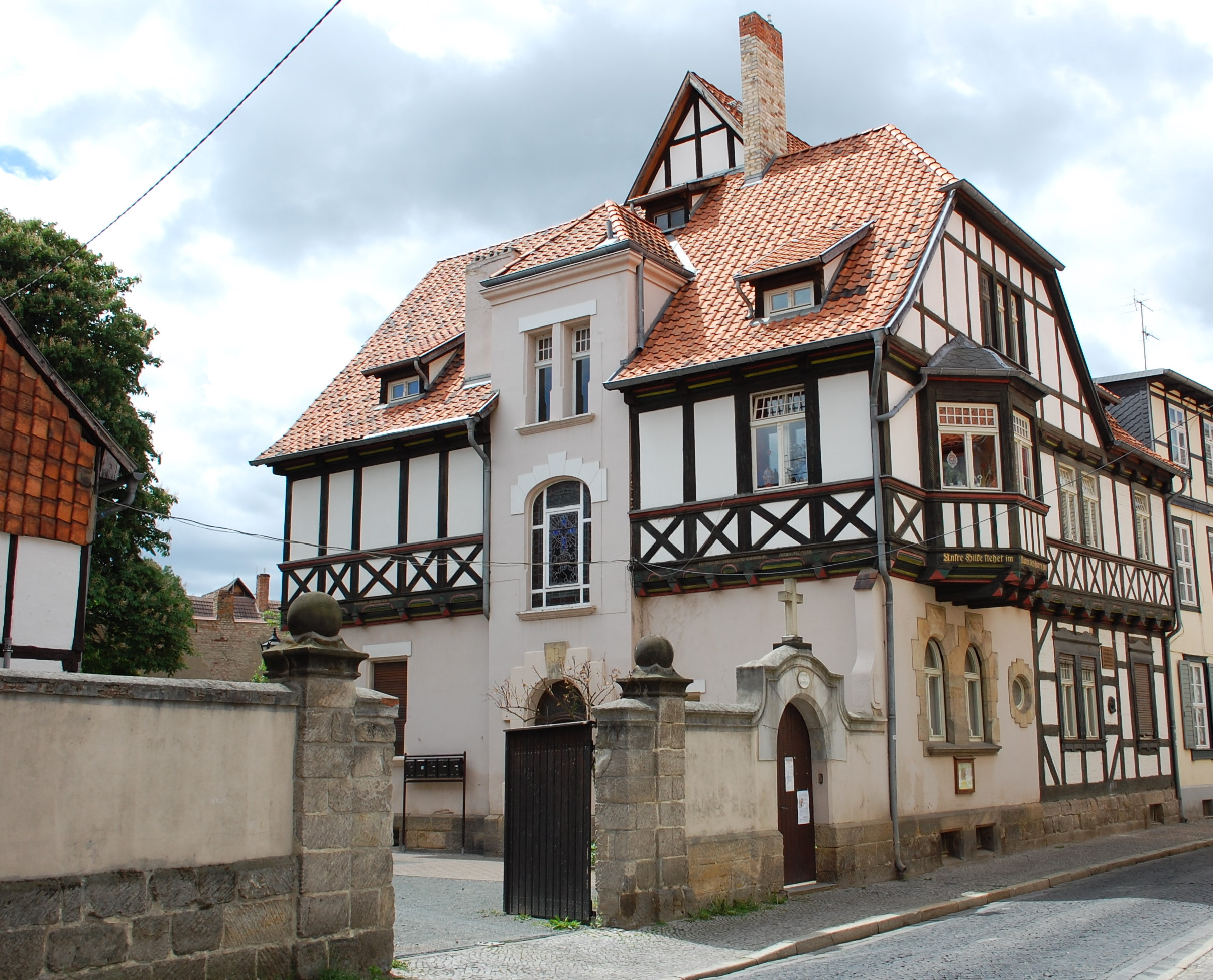 Haus in der Straße Kaplanei in Quedlinburg